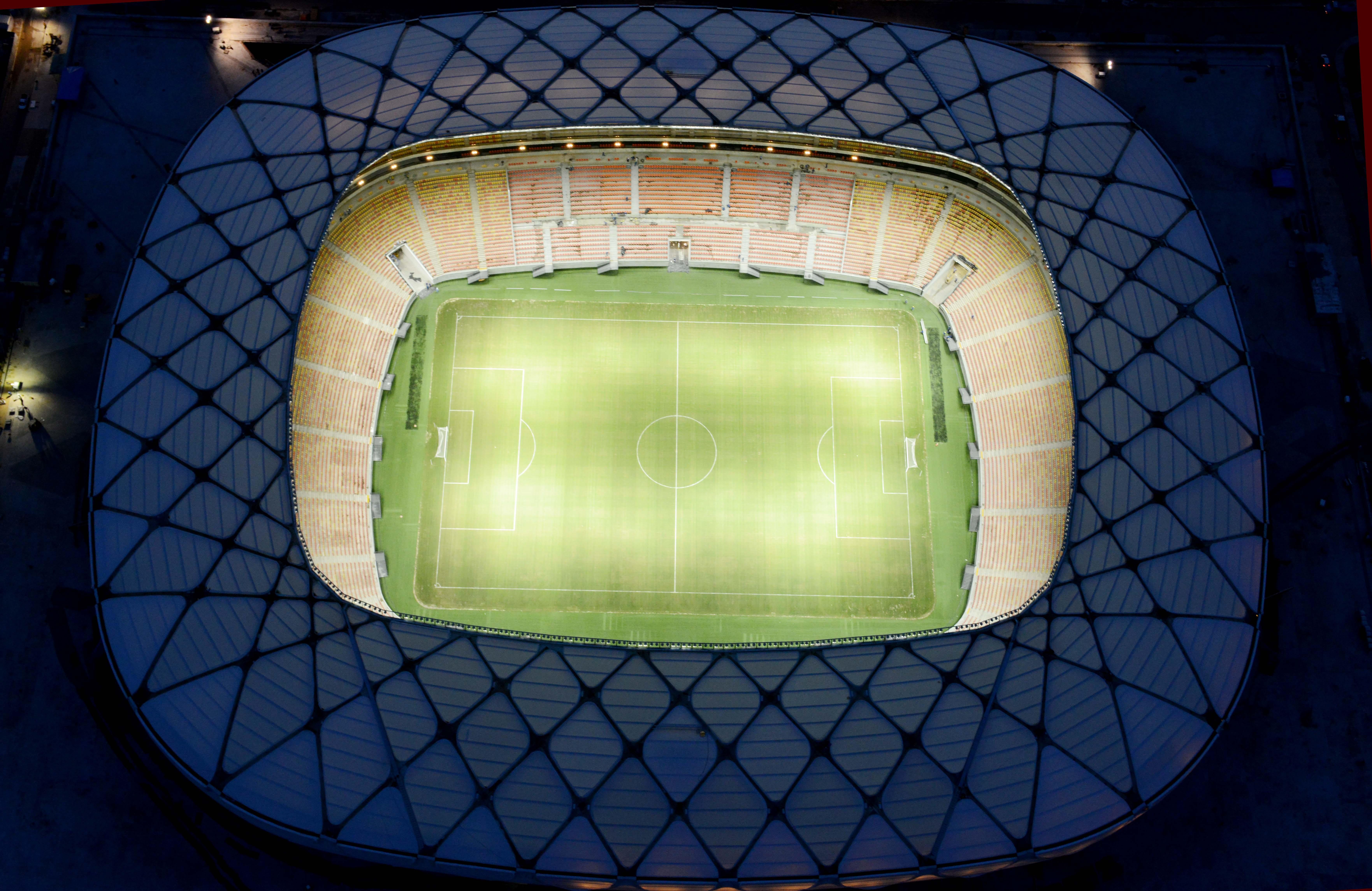 Arena da Amazônia, com capacidade oficial para 44 mil pessoas, em Manaus.